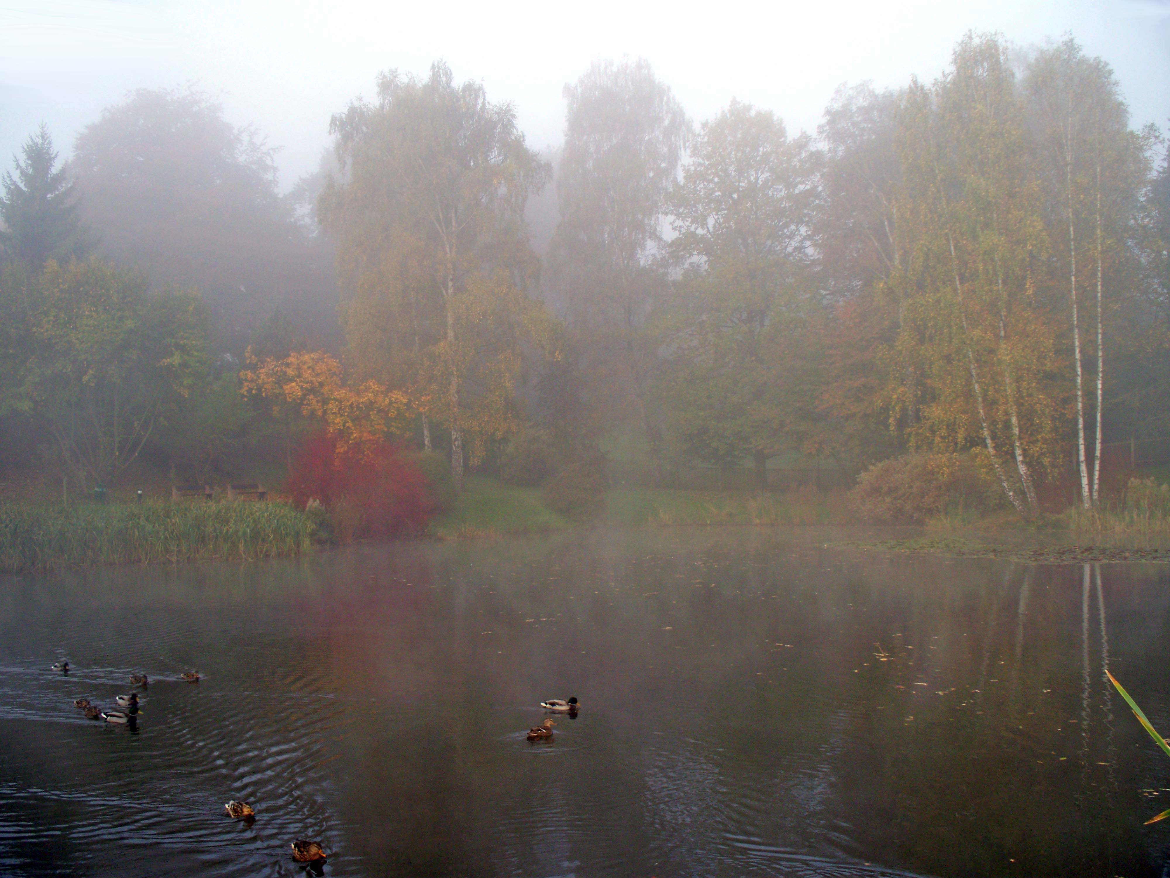 Kurpark Bad Klosterlausnitz